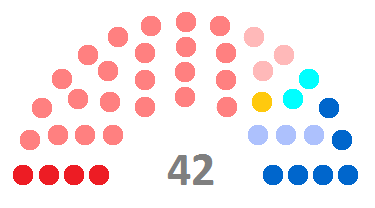 Répartition des sièges au conseil départemental de la Haute-Vienne